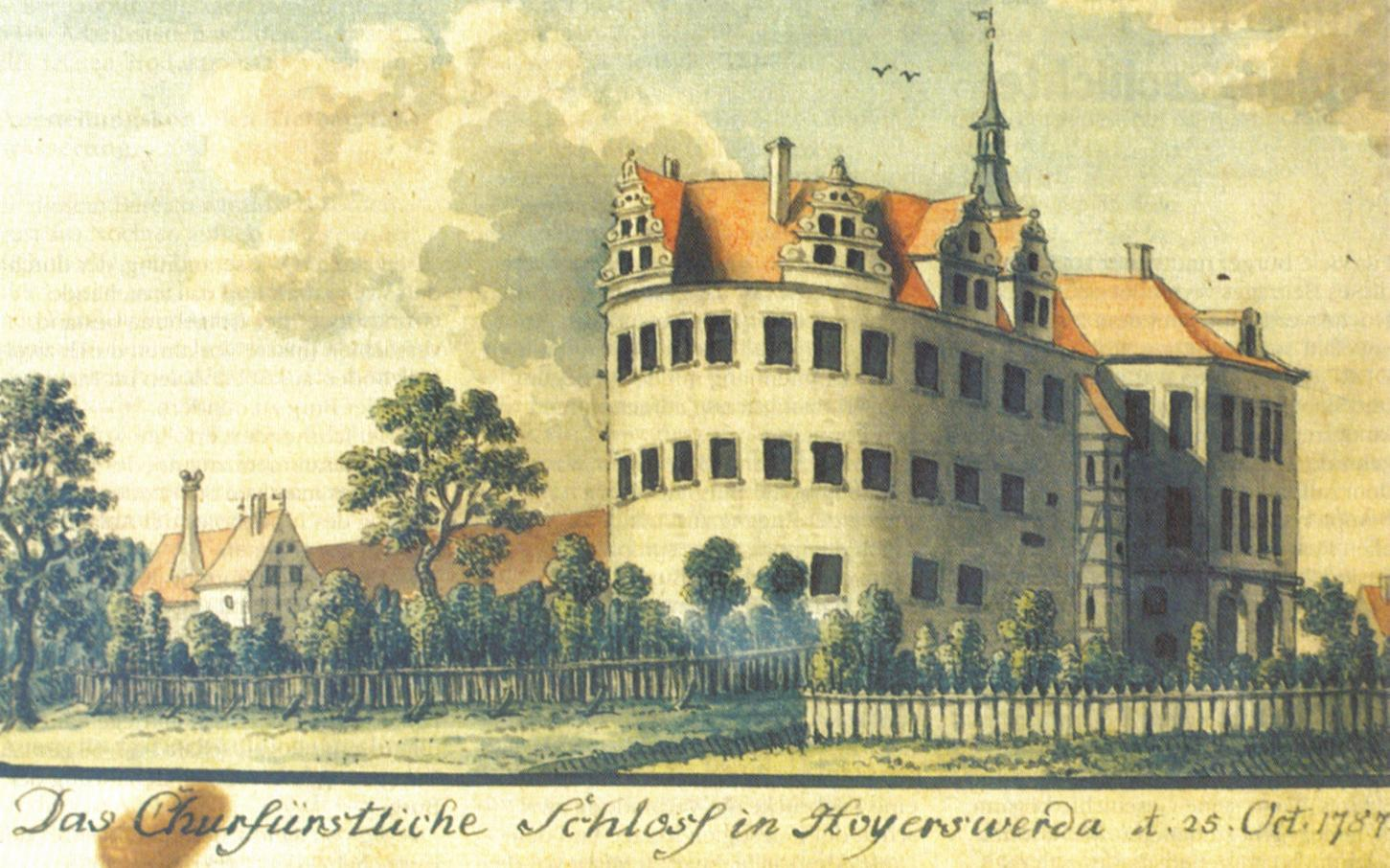 Schloss Hoyerswerda, gezeichnet von Johann Gottfried Schultz (1734–1819)